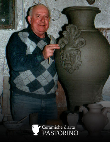 Ceramista artista Pastorino Mario - Albisola - Ceramiche Pastorino